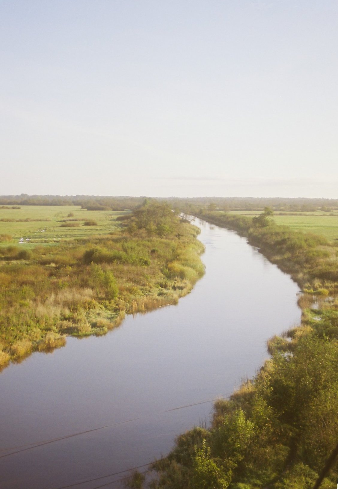 Kasari jõgi ja luht